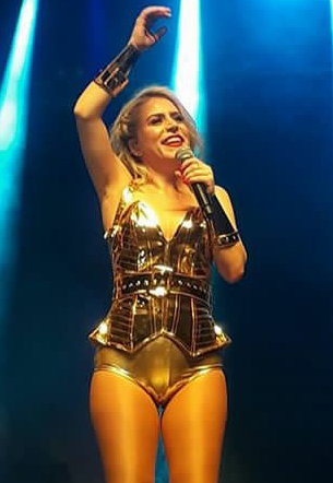 Lu na turnê Rouge 15 Anos, 2018.